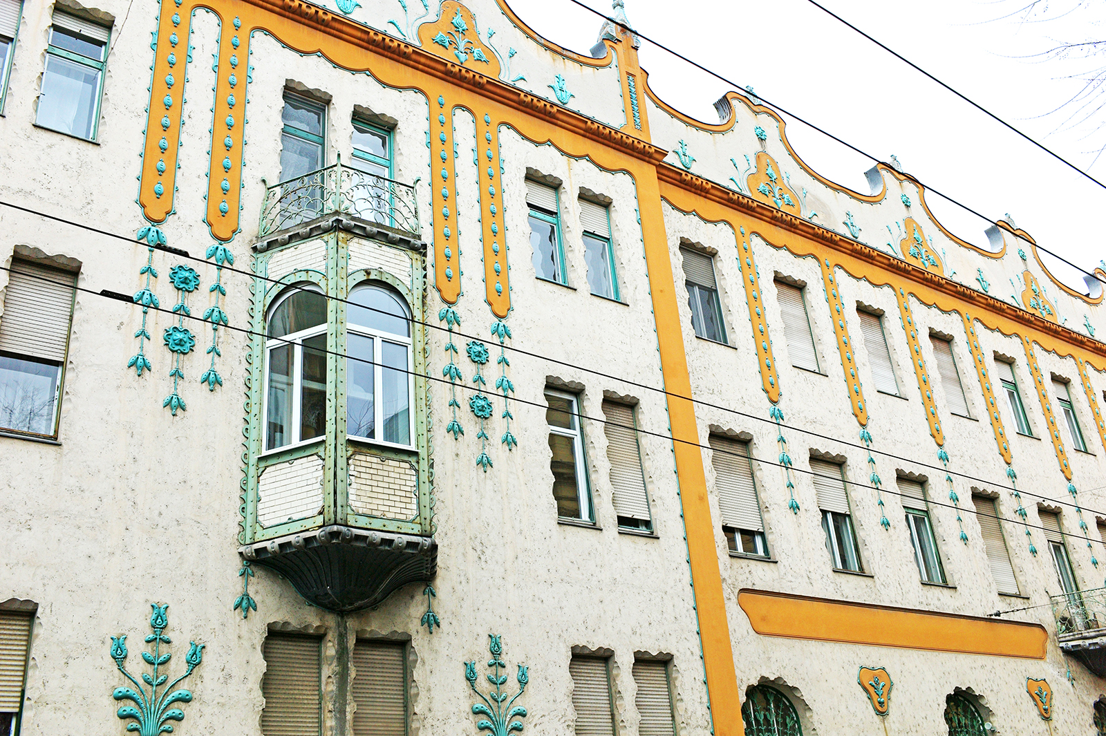 Deutsch-palota